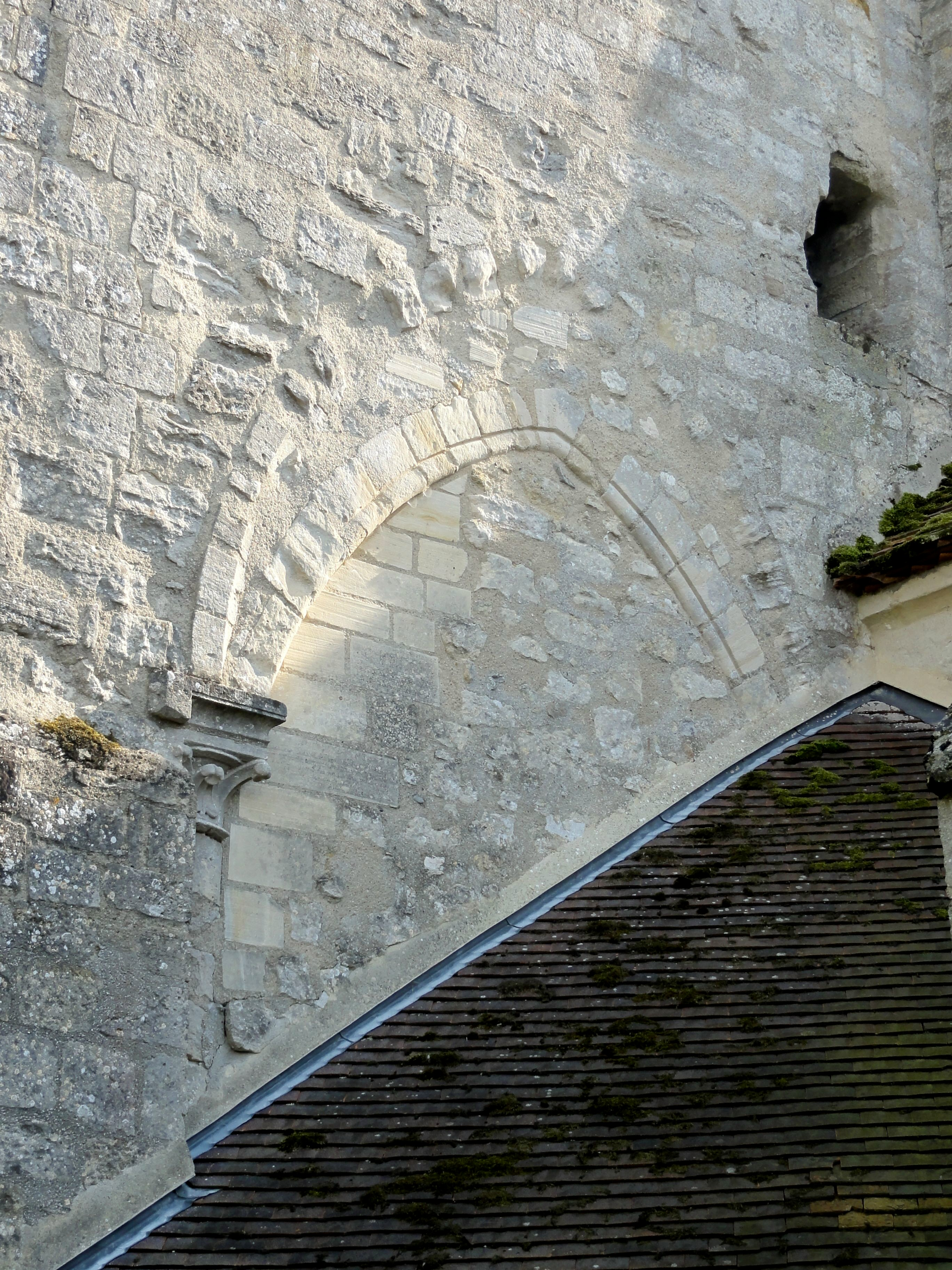 Croisillon nord, arcade bouchée côté ouest.